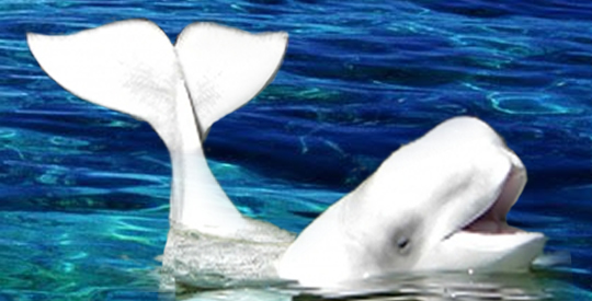 Ballena blanca.